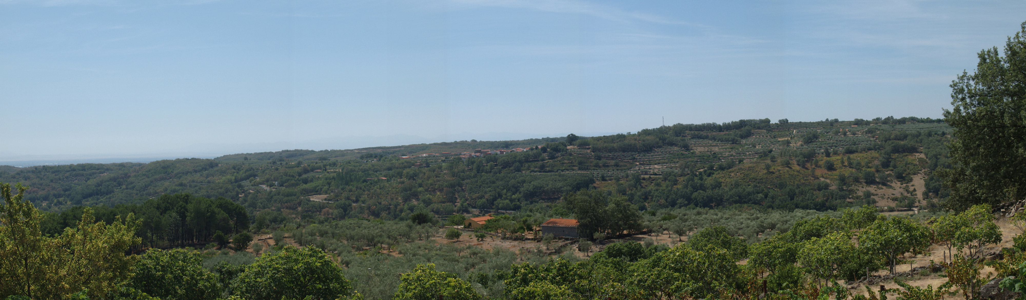 Robledillo de la Vera, provincia de Cáceres, España. Vista de la población en su entorno desde las inmediaciones de Losar de la Vera.